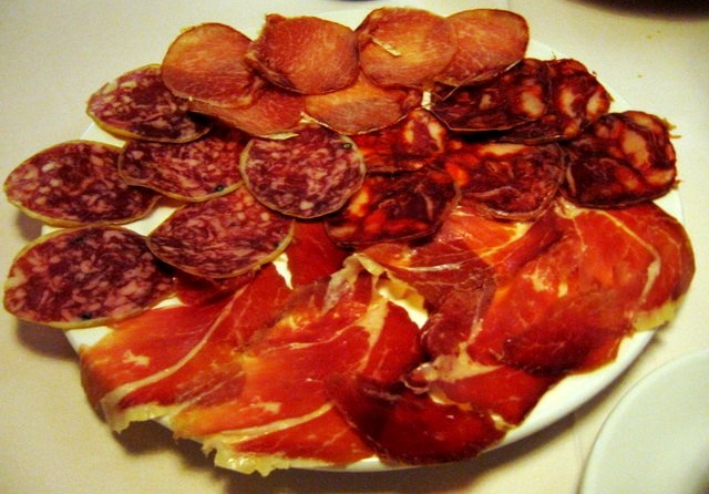 Surtido de embutidos ibéricos. Posada Casa de la Sal, en Candelario (Salamanca).